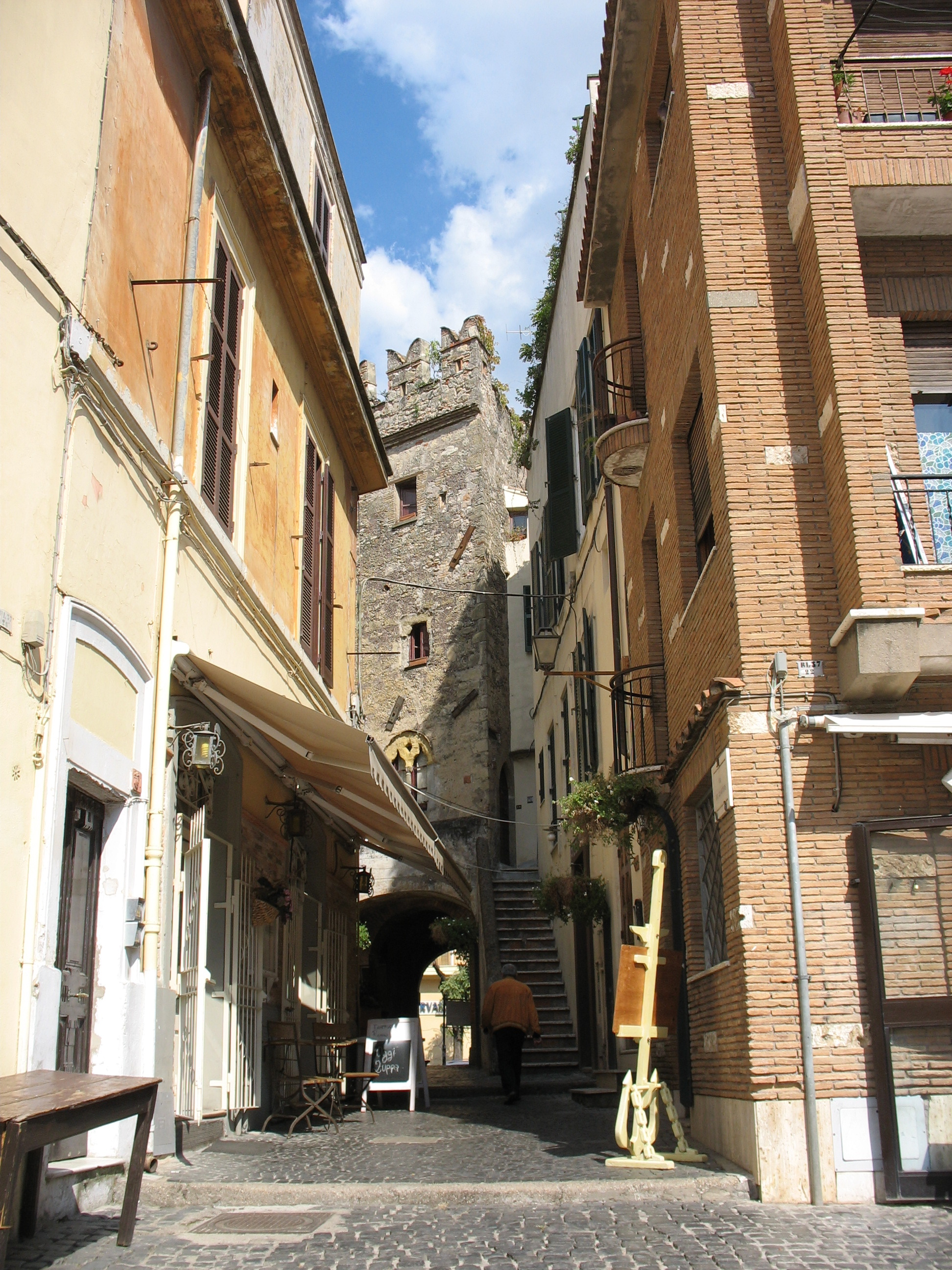 Stefano, foto mia, foto città , gfdl